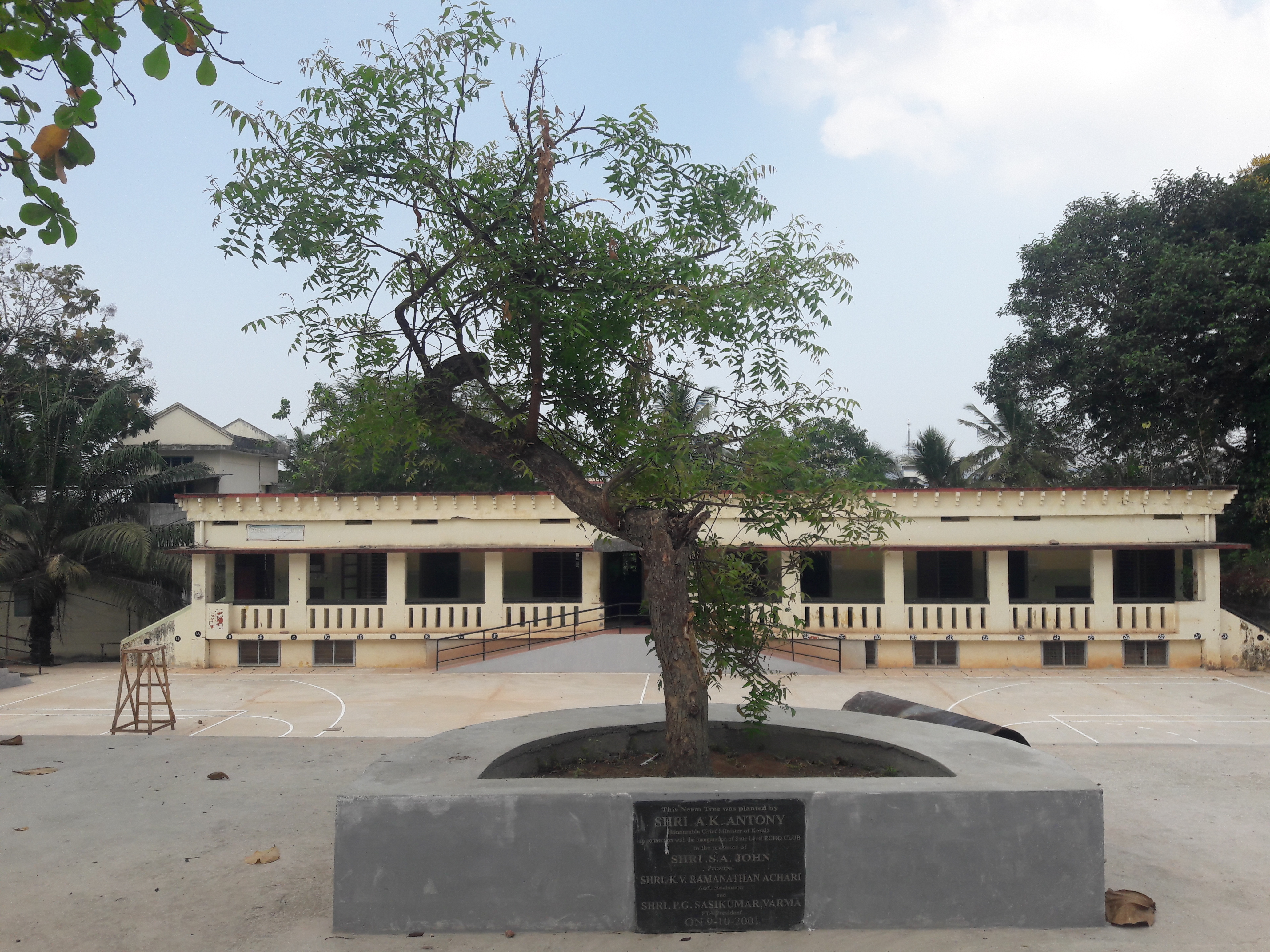 ഗവ. മോഡൽ ബോയ്സ് എച്ച്.എസ്.എസ്, തൈക്കാട് വളപ്പില്‍ വളരുന്ന ഒരു ആര്യവേപ്പ്. Neem tree ശാസ്ത്രീയ നാമം Azadirachta indica കുടുംബം Meliaceae.